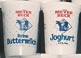 Verpackungen der Buttermilch und vom Joghurt von Meyer Beck im Jahr 1996